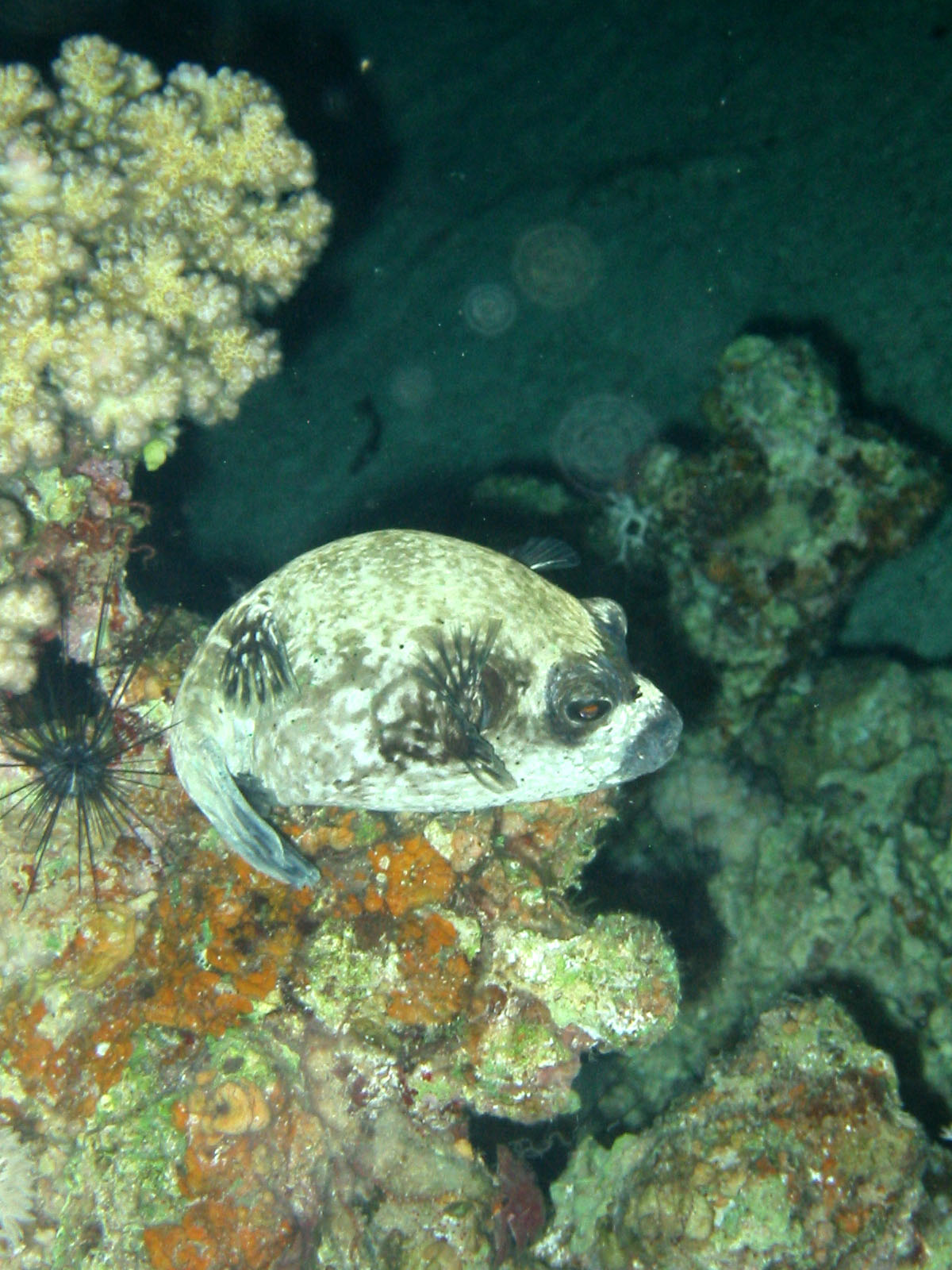 masked puffer at night